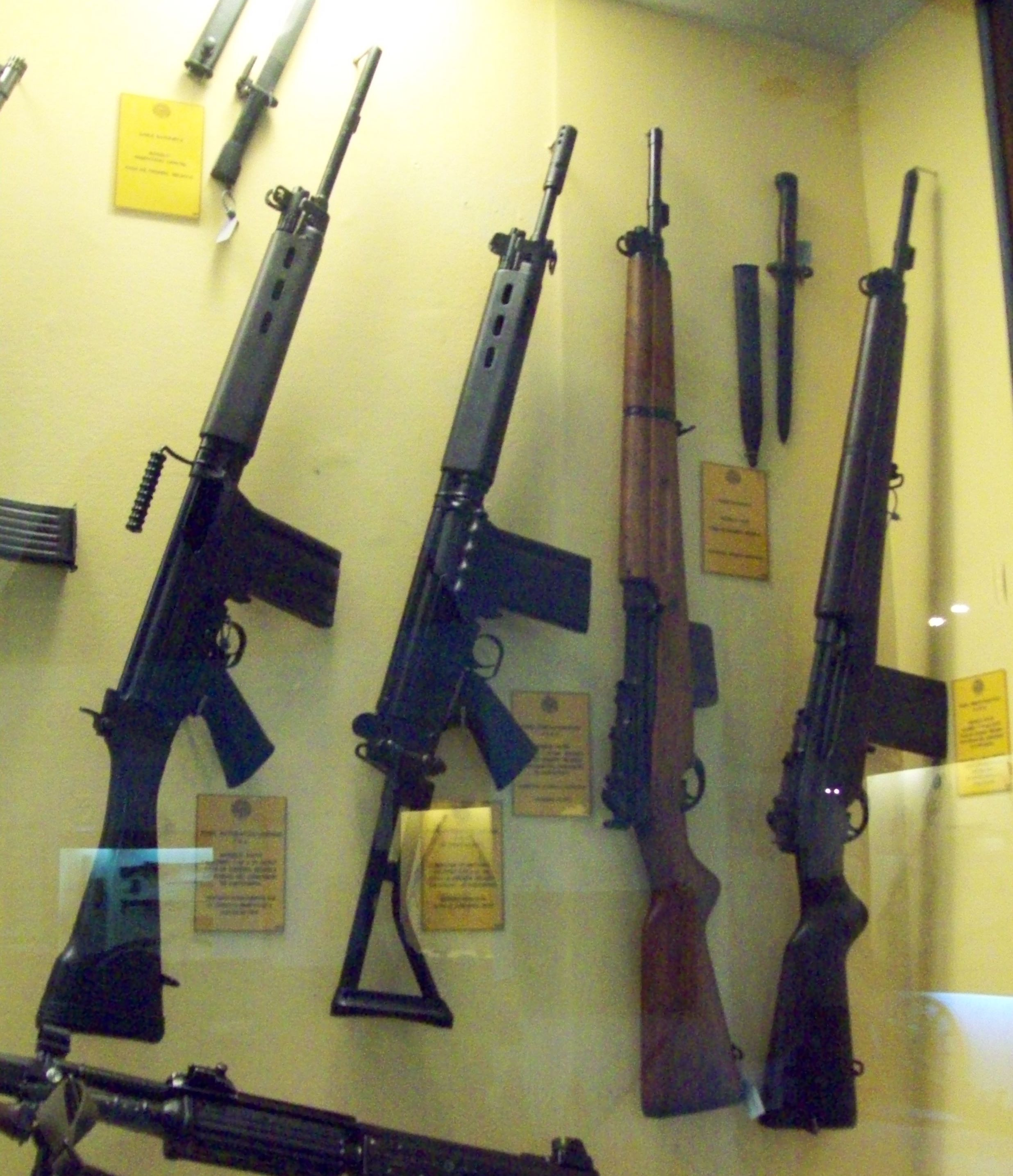 Armamento expuesto en el Museo de Armas de la Nación, ciudad de Buenos Aires, Argentina 2014.